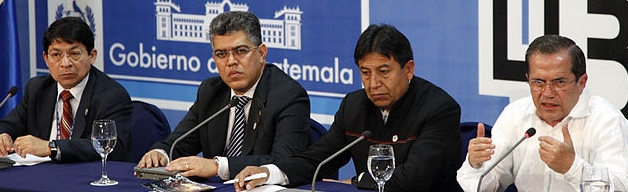 Antigua (Guatemala), 6 de junio 2013. La rueda de prensa fue ofrecida por: el Canciller del Ecuador, Ricardo Patiño, junto a sus homólgos de Venezuela, Elías Jaua, y Bolivia, David Choquehuanca, y el Representante Permanente de Nicaragua ante la OEA, Denis Moncada. Foto: Fernanda LeMarie - Cancillería del Ecuador.